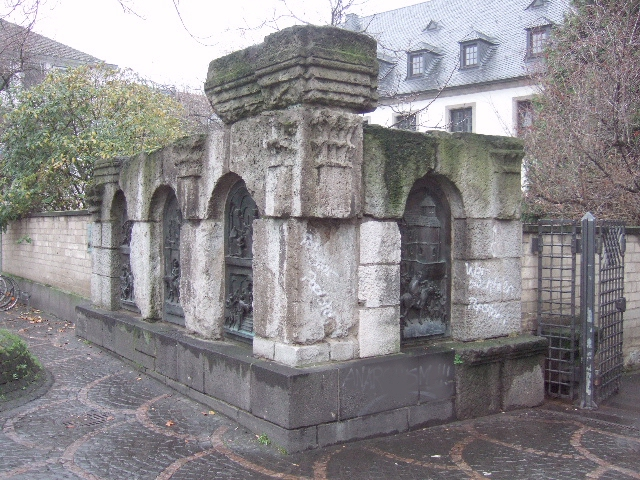 römisches Bauwerk vor dem Bonner Münster mit Bronzereliefs von Ernemann Sander